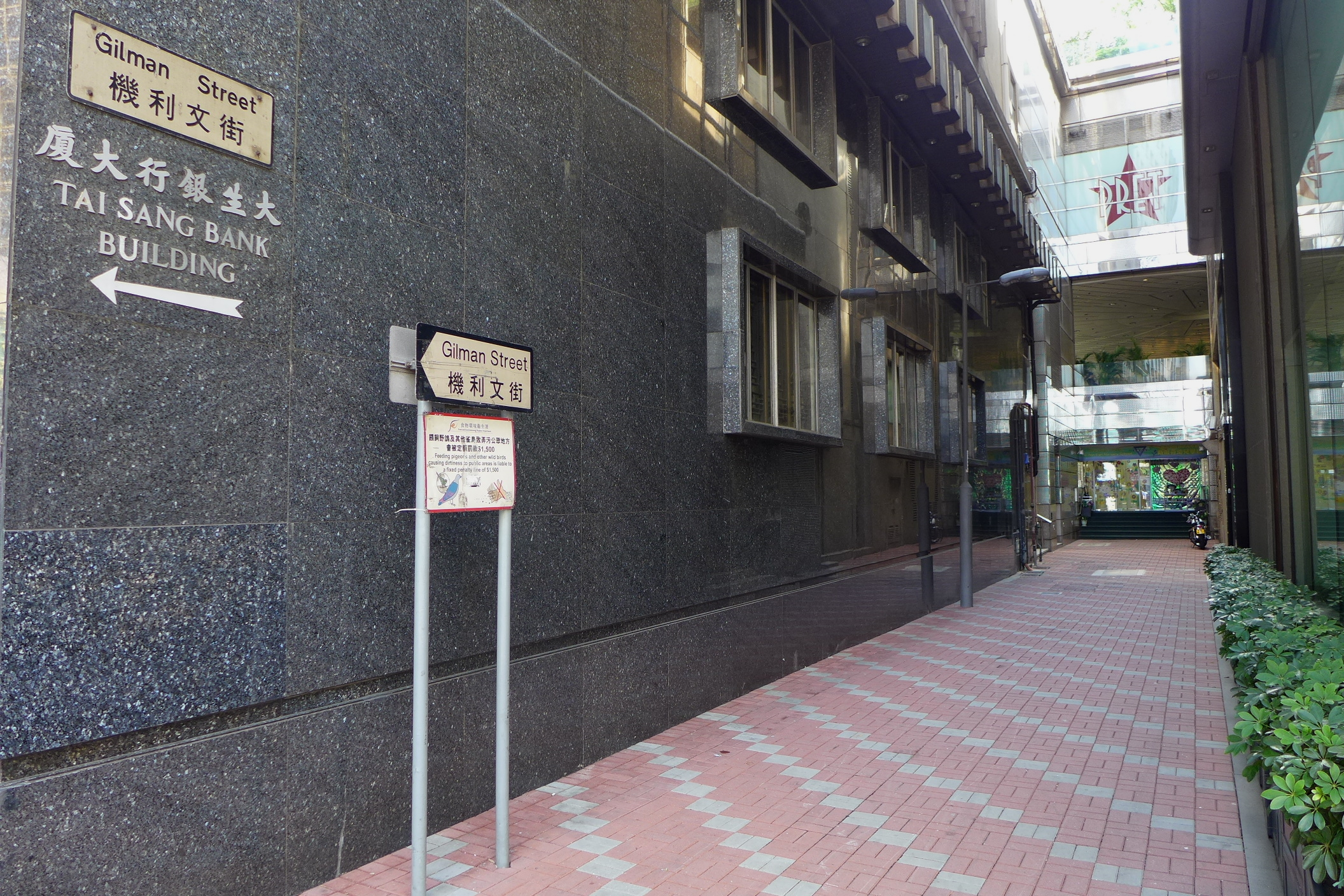 Gliman Street Dead-end part